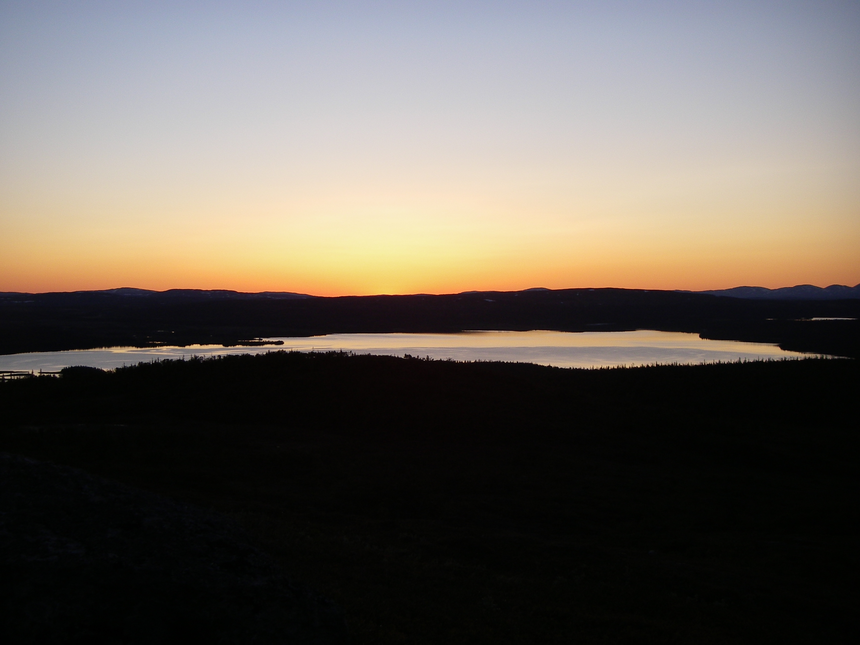 Medstugusjön, Åre kommun, Jämtlands län, Sweden. Close to midnight (camera time faulty).